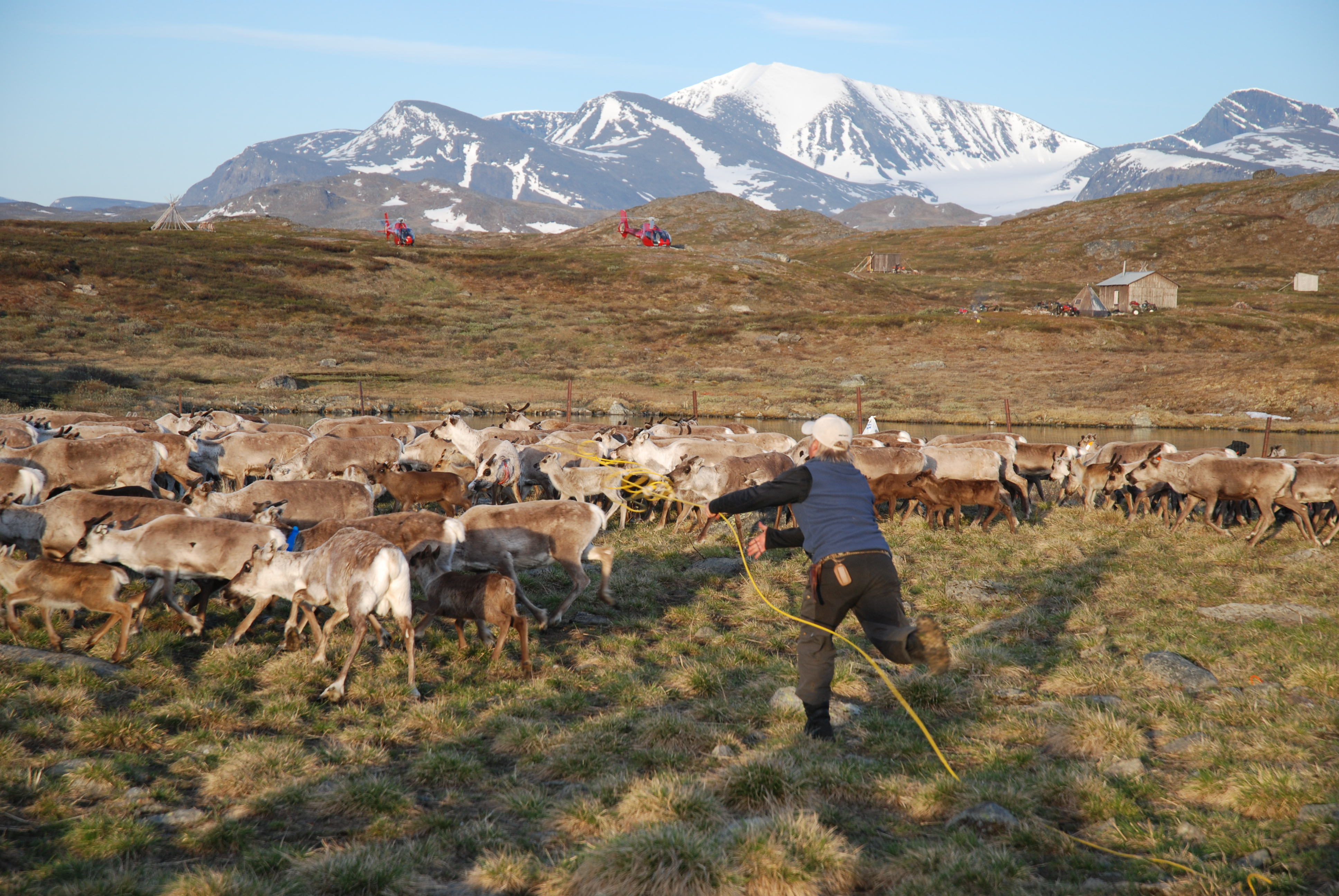 Gabna sameby i Nord-Sverige